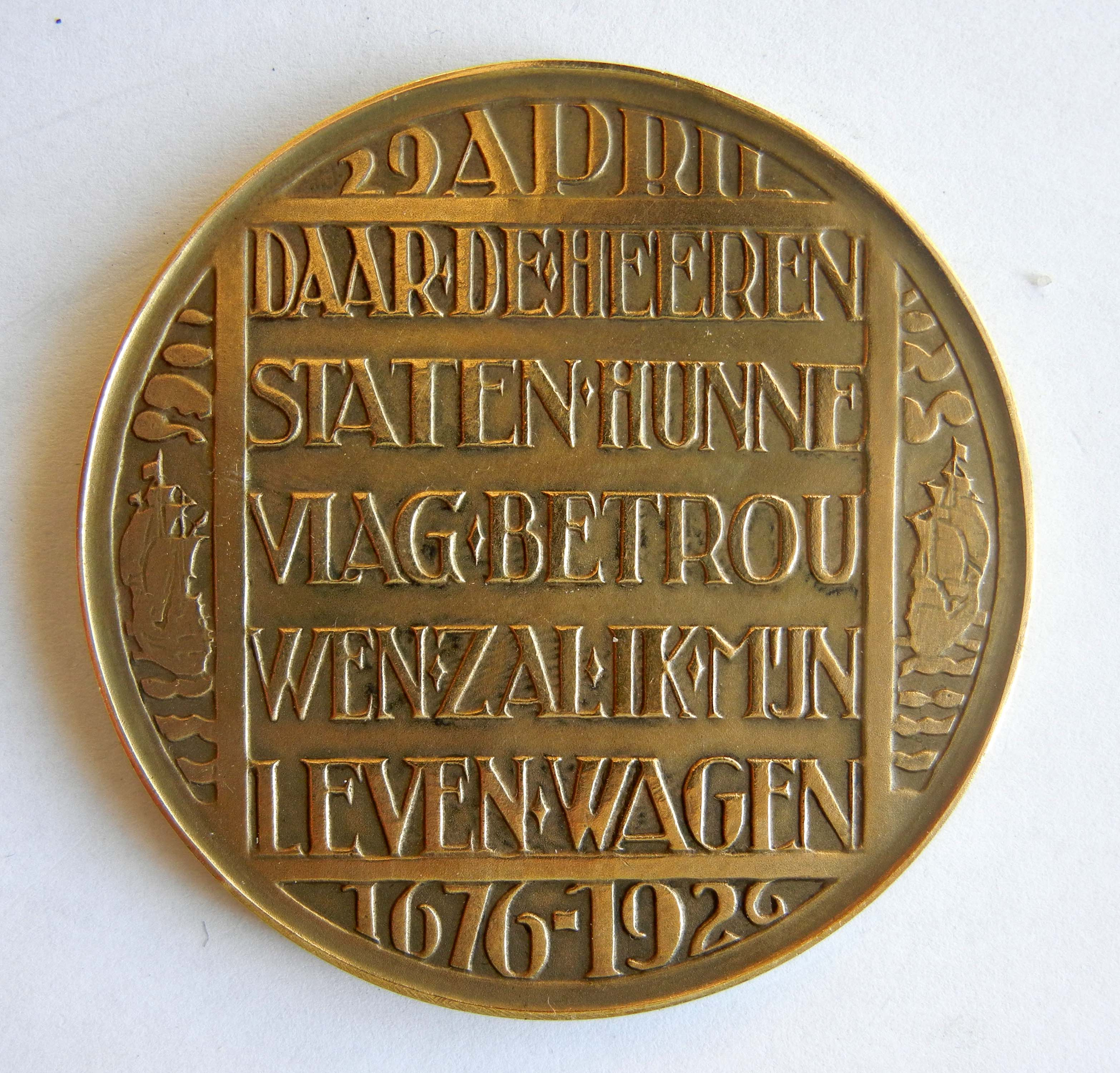 Médaille MICHIEL ADRIAANSZ. DE RUYTER 250e anniversaire (1676-1926) de la mort de l'amiral néerlandais Michiel de Ruyter (1607-1676) Graveur inconnu en bronze Diamètre 60 mm Poids 68 grs